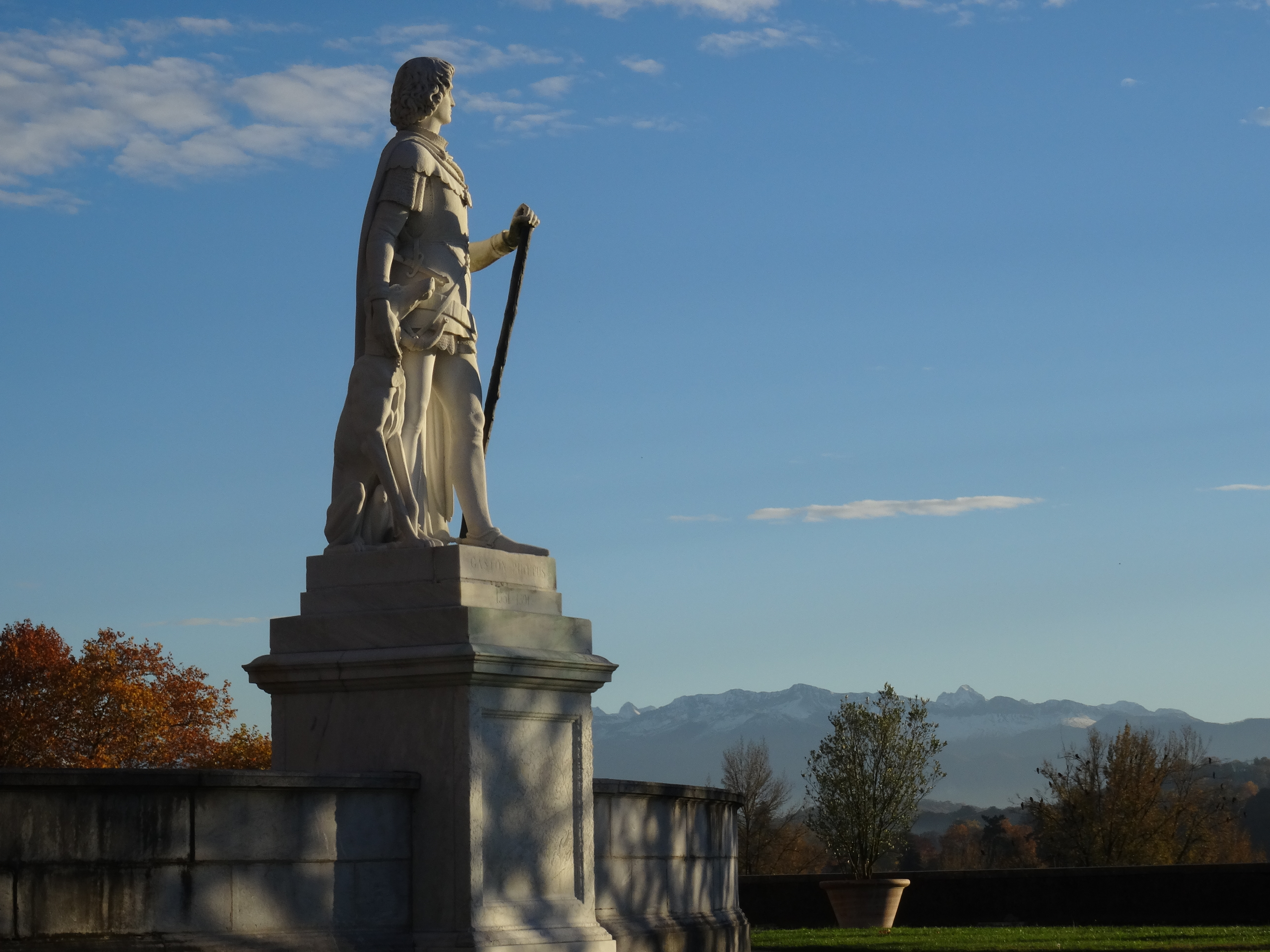 Statue de Gaston Fébus à Pau regardant les Pyrénées